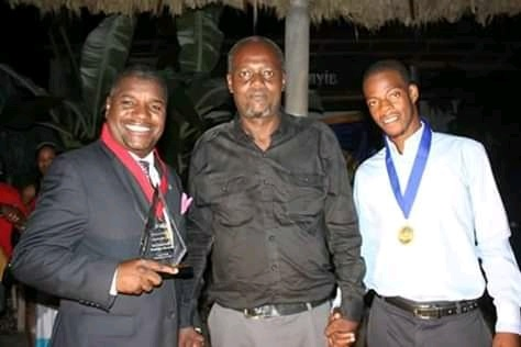 Dominique Batraville au milieu des deux lauréats du prix poésie créole qui porte son nom en 2015 à la ville de Jacmel